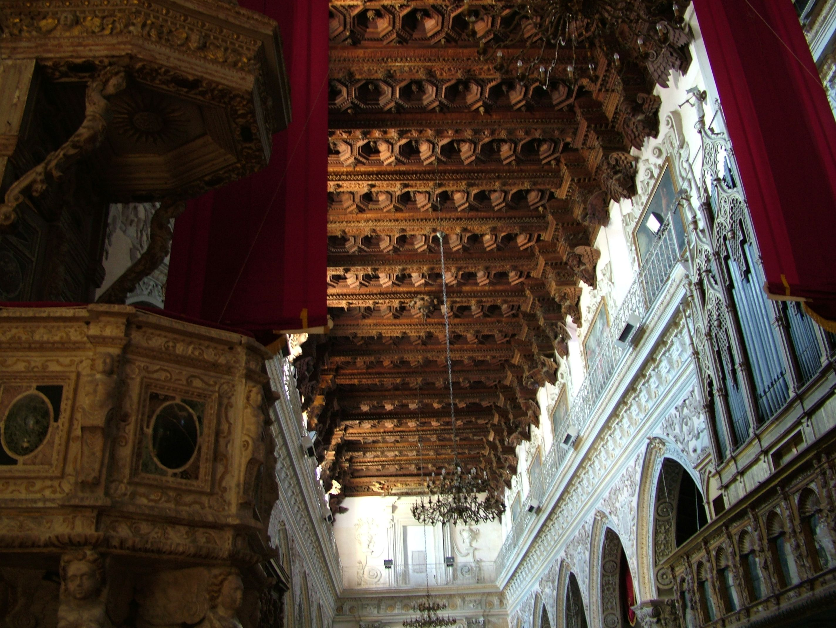 Enna, Sizilien, die Decke des Domes